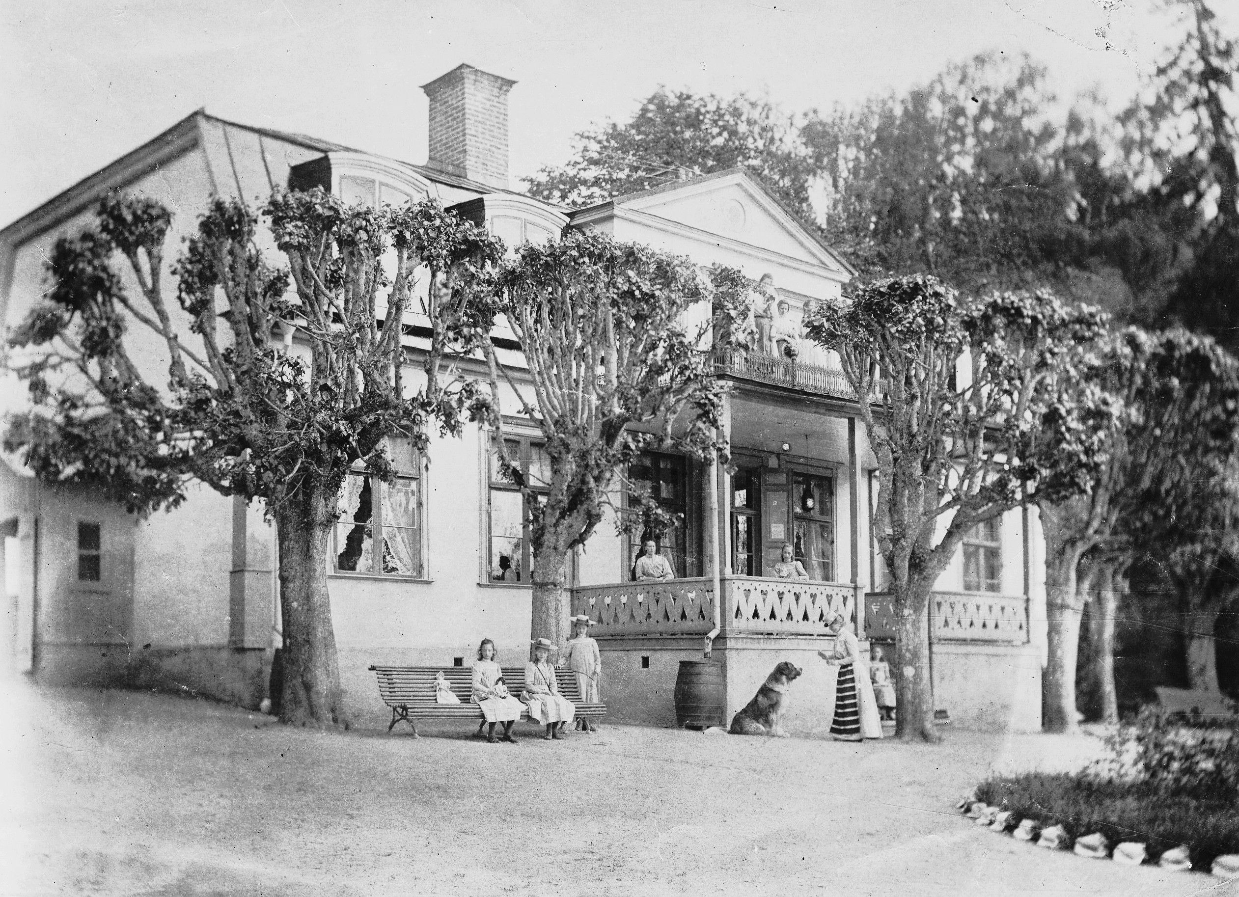 Johannesdals gård kring 1900